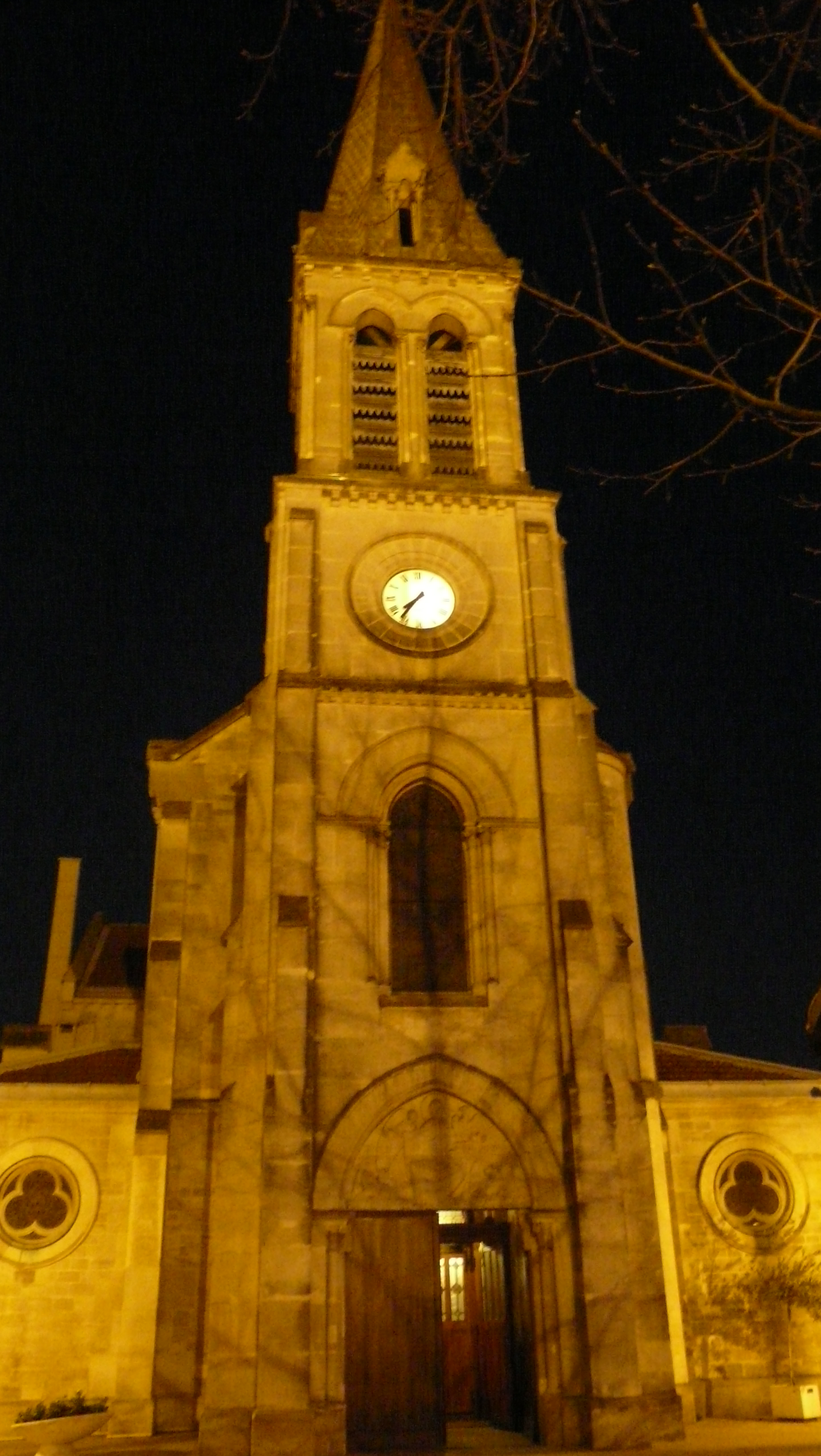 L’église de Garches une nuit d'hiver